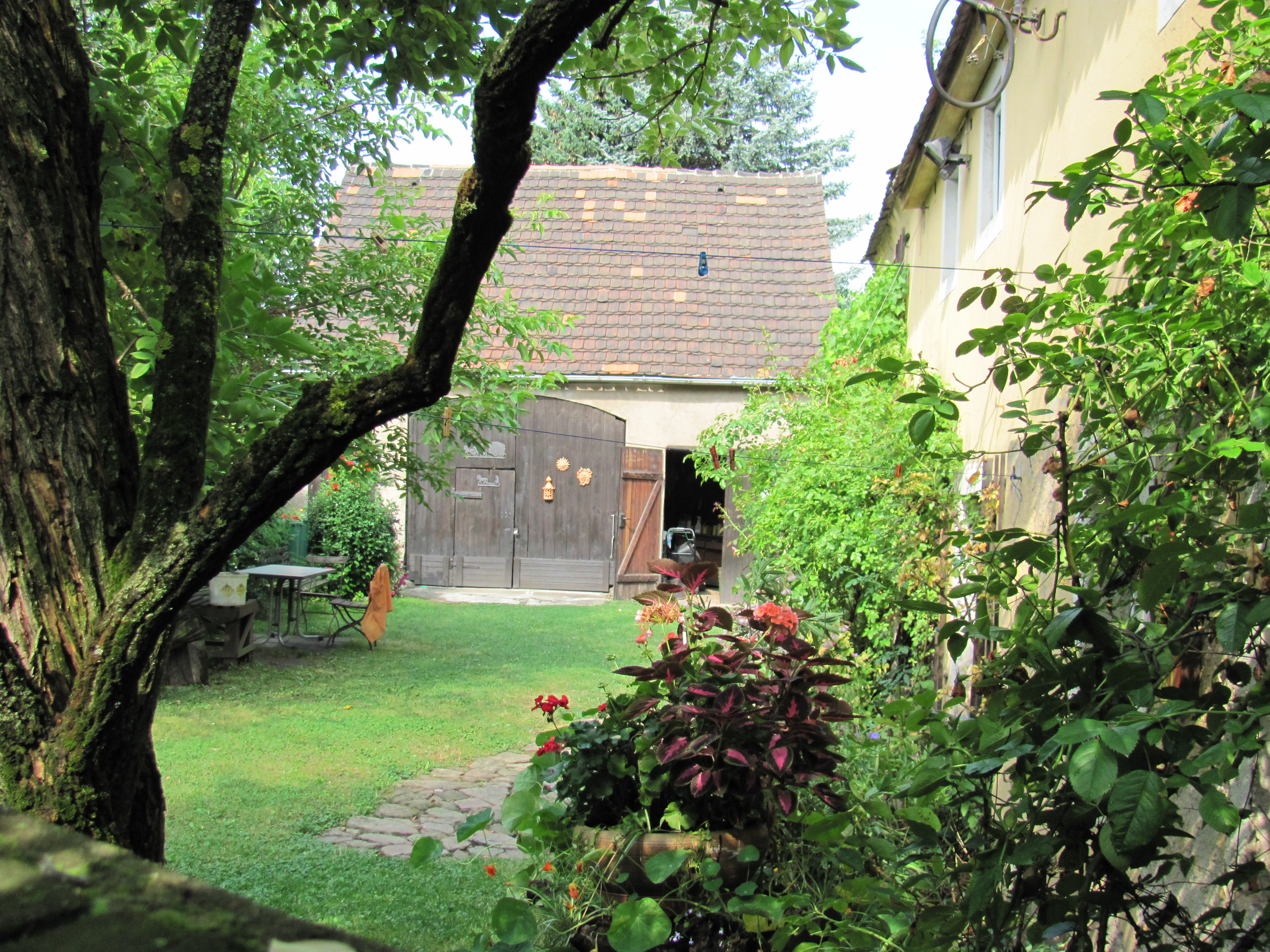 Altnaundorf